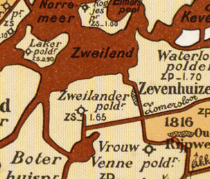 Waterloospolder